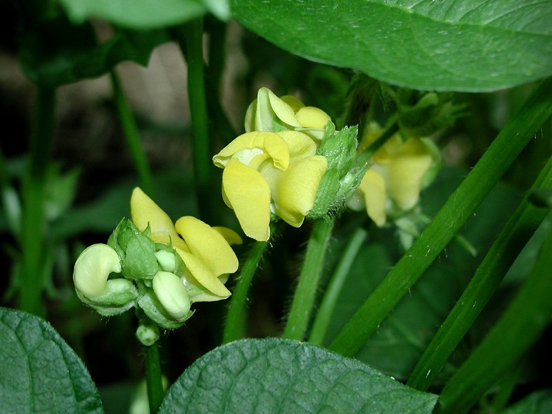 アズキ 撮影場所：広見町 撮影日：２００１年９月８日